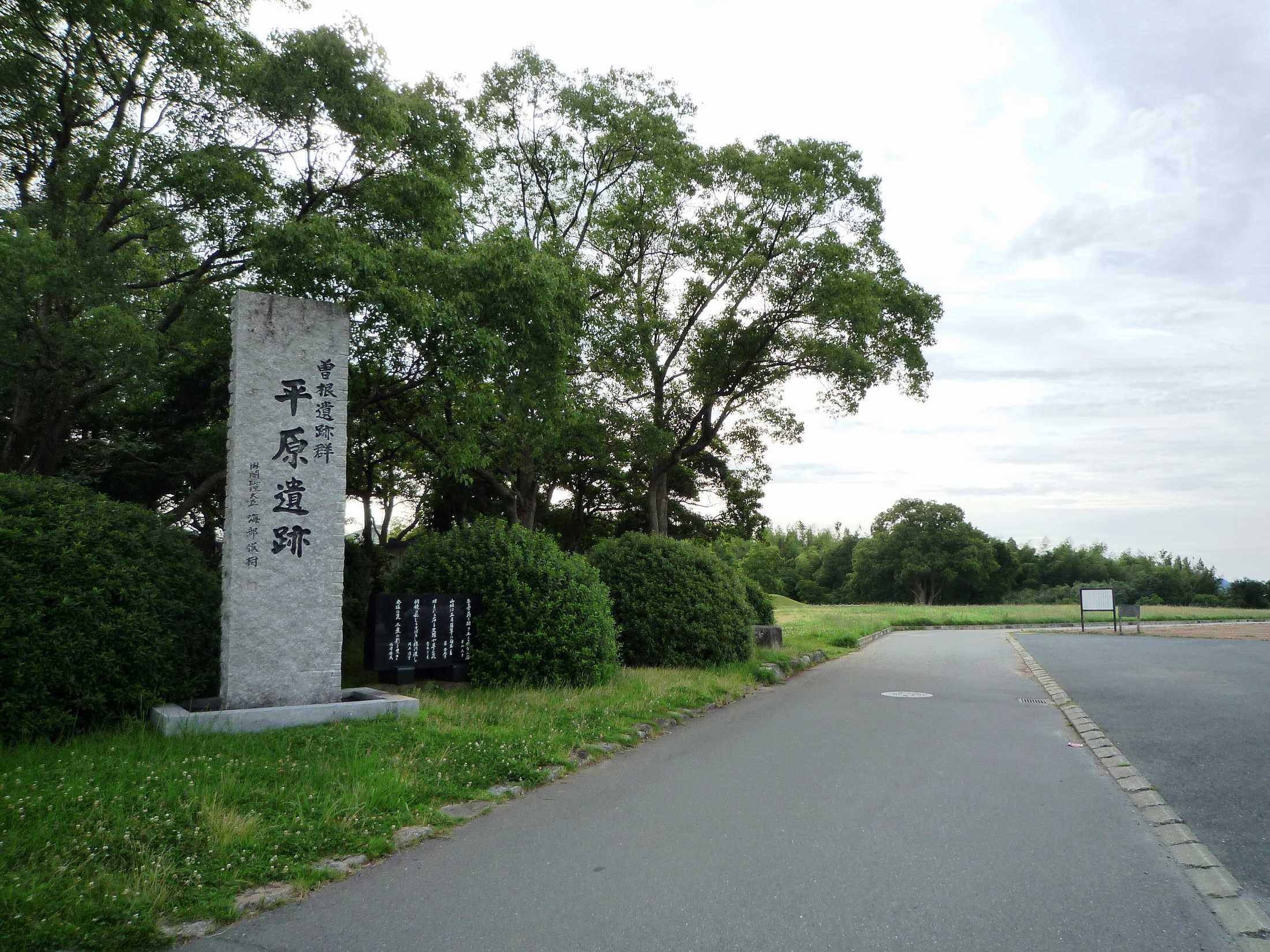 平原遺跡入り口